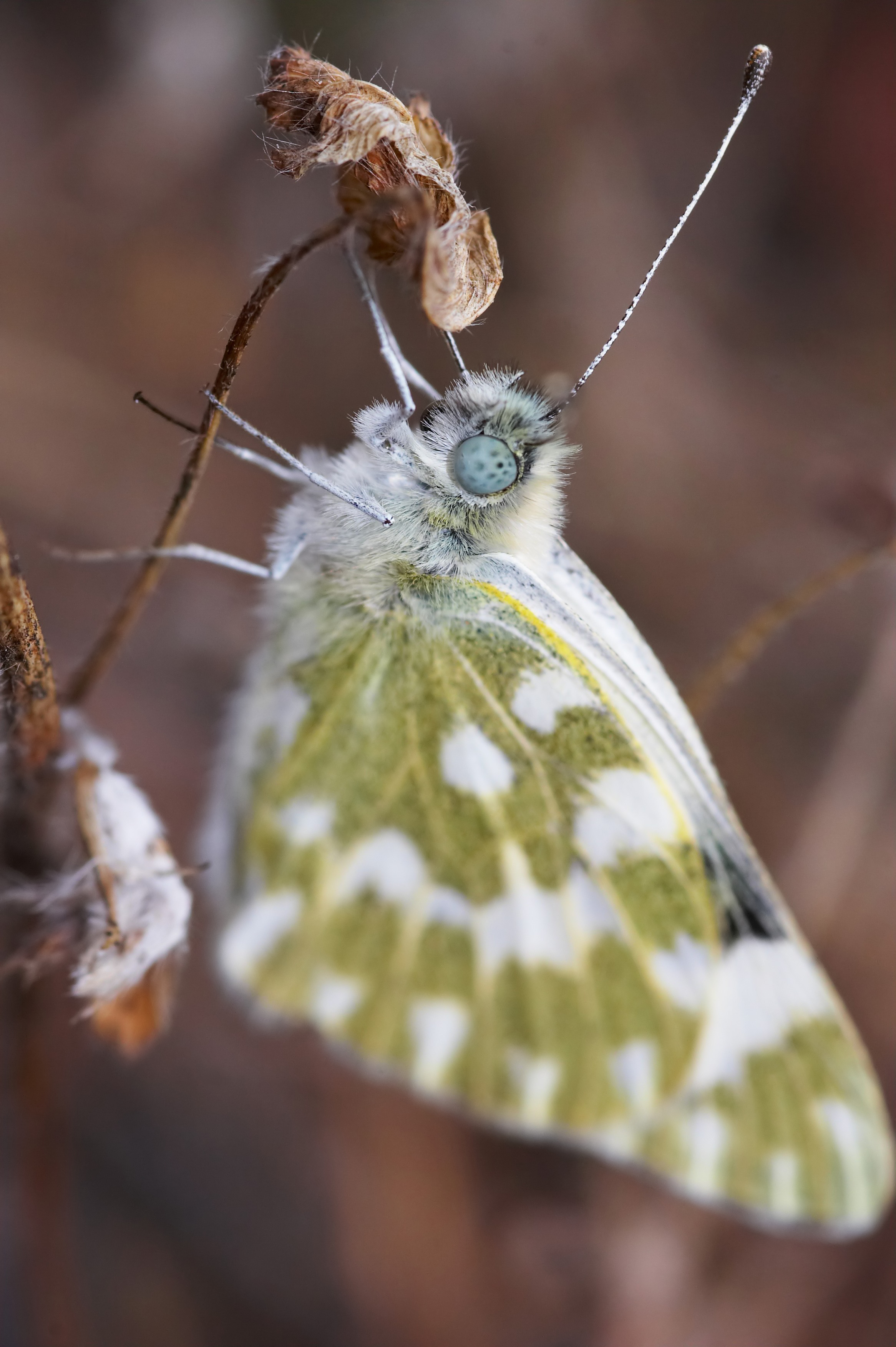 Pontia daplidice daplidice, La Palma, Canary Islands